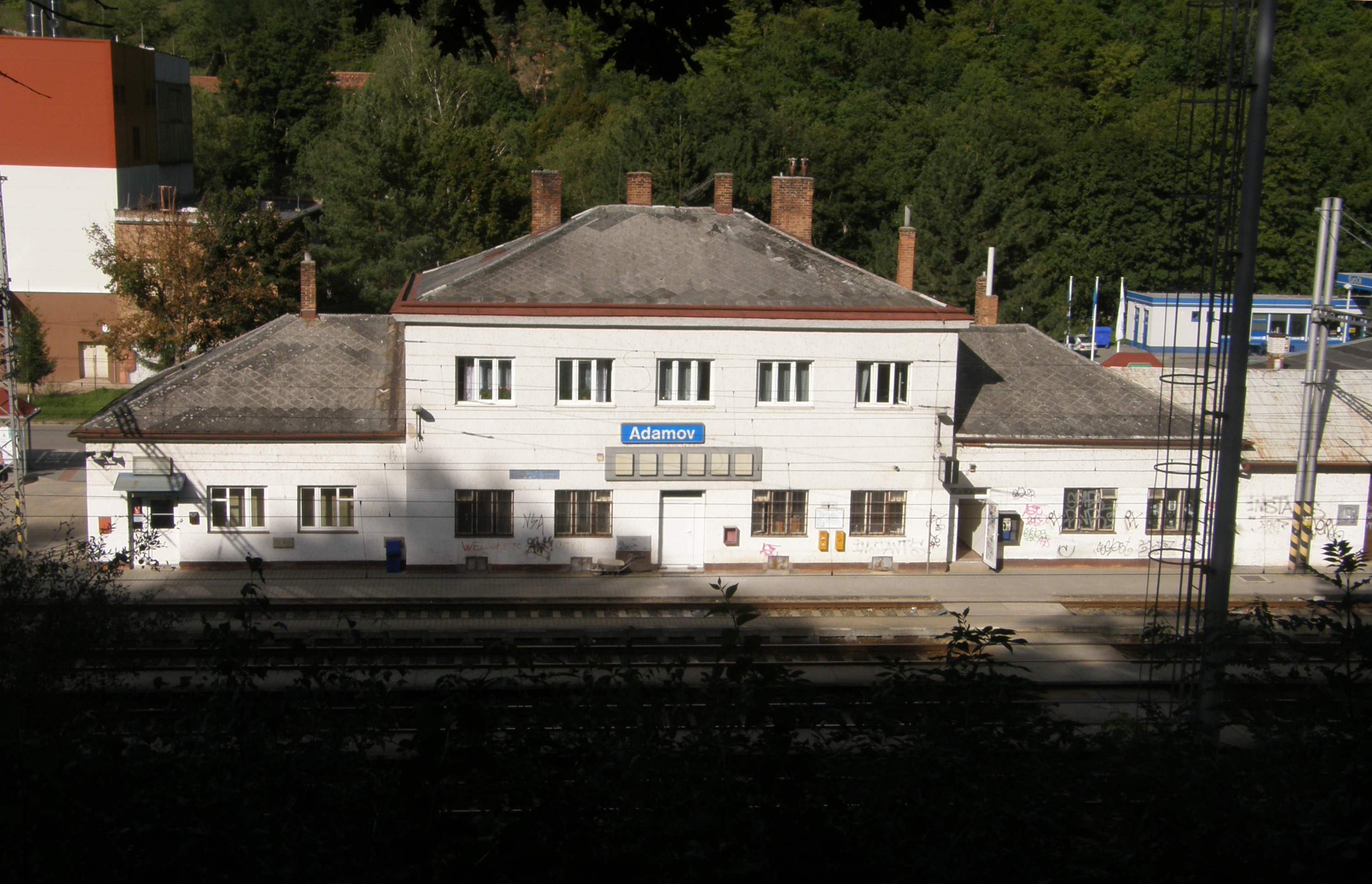 Železniční stanice v Adamově